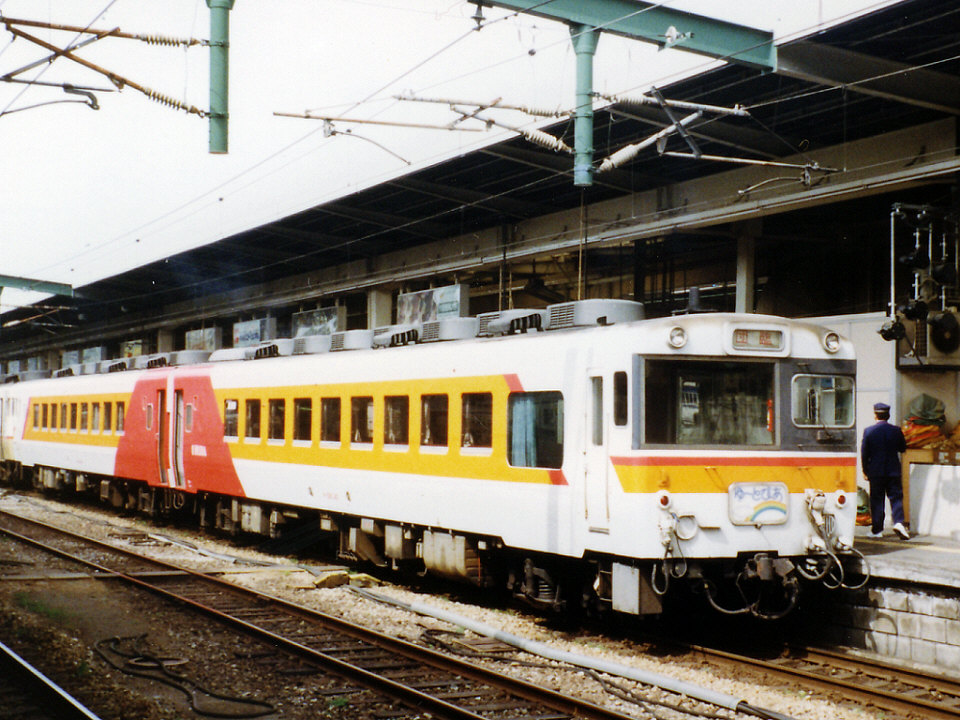 JR九州キハ58系「ゆ～とぴあ」博多駅にて